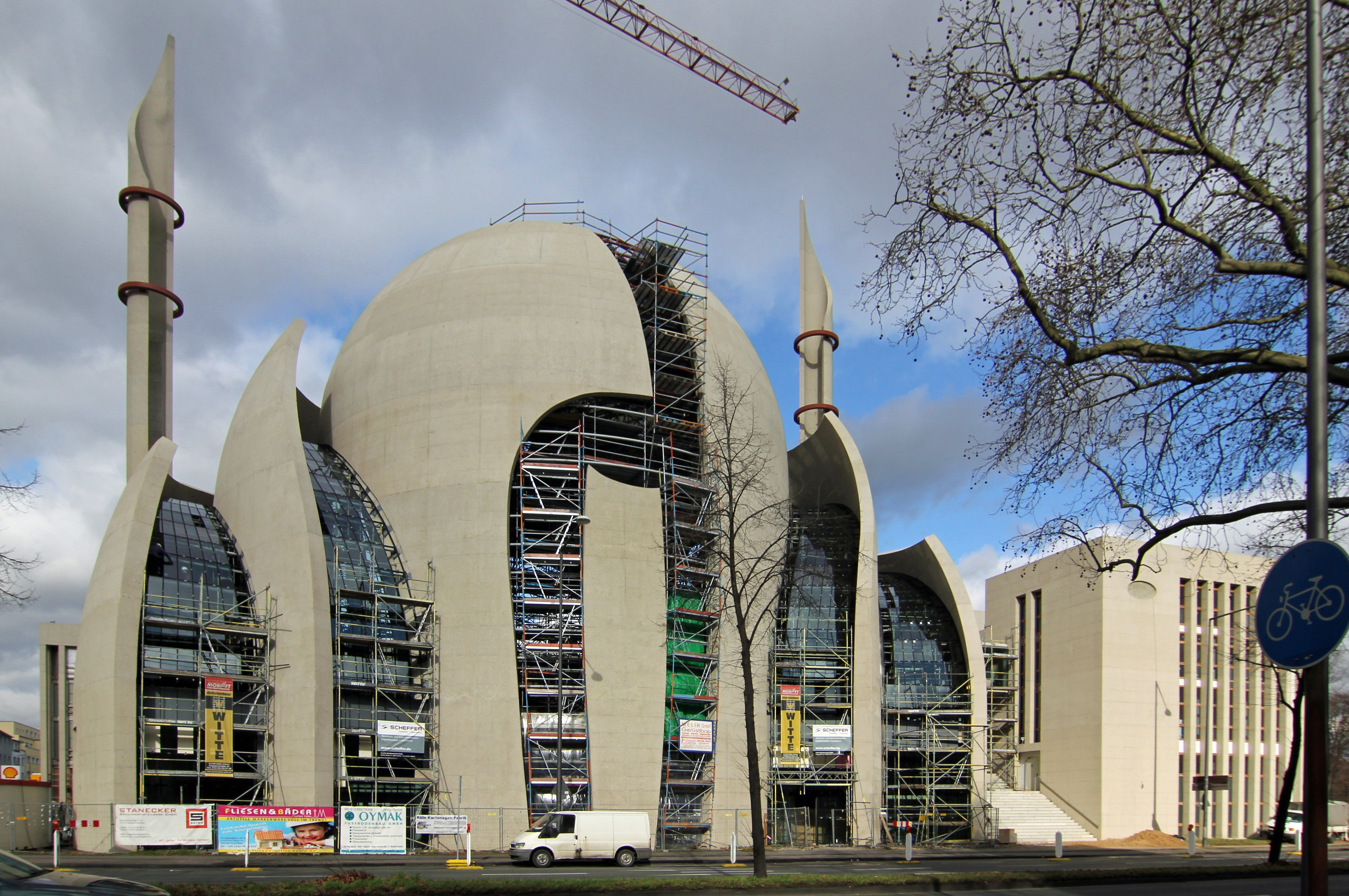 Rohbau der DITIB-Zentralmoschee Köln-Ehrenfeld. Architekt: Paul Böhm und Gottfried Böhm. Grundsteinlegung: 7. November 2009.